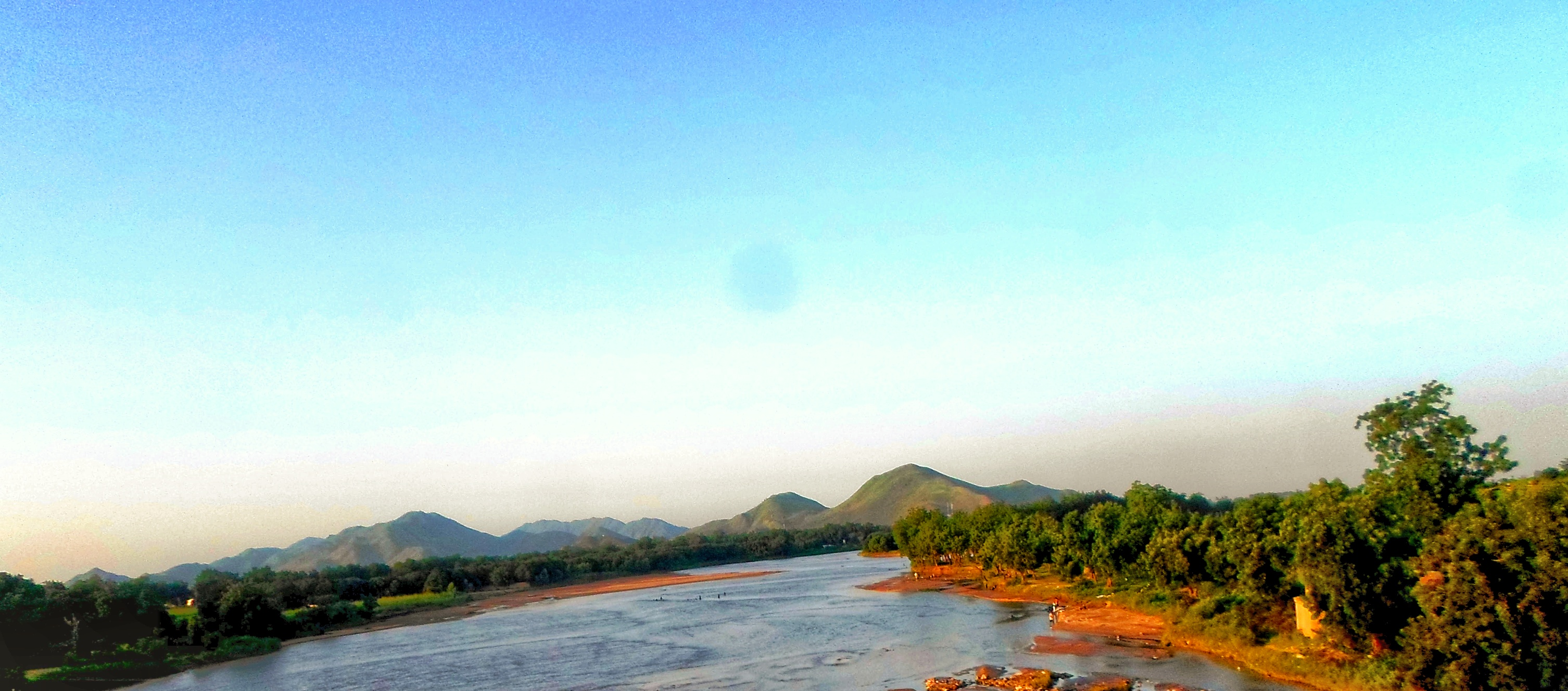 sur le pont makabay. Maroua, extrême-nord cameroun.